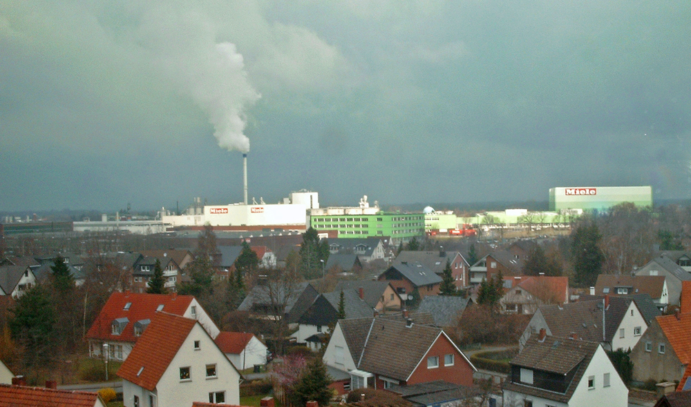 Mielewerke in Gütersloh